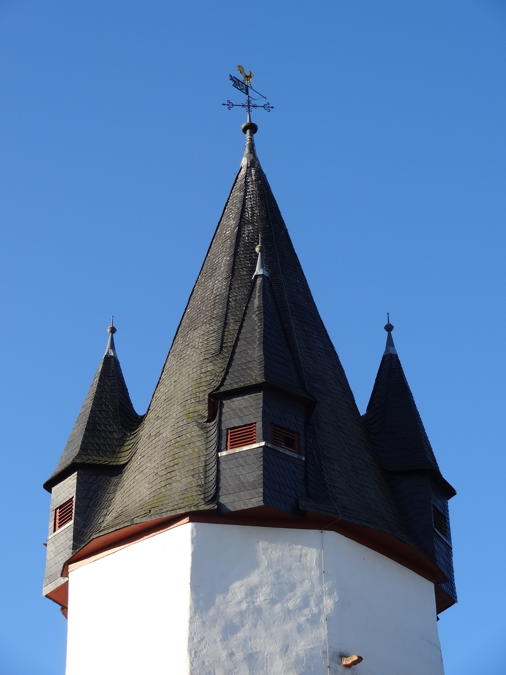 Evangelische Pfarrkirche (Ostheim)